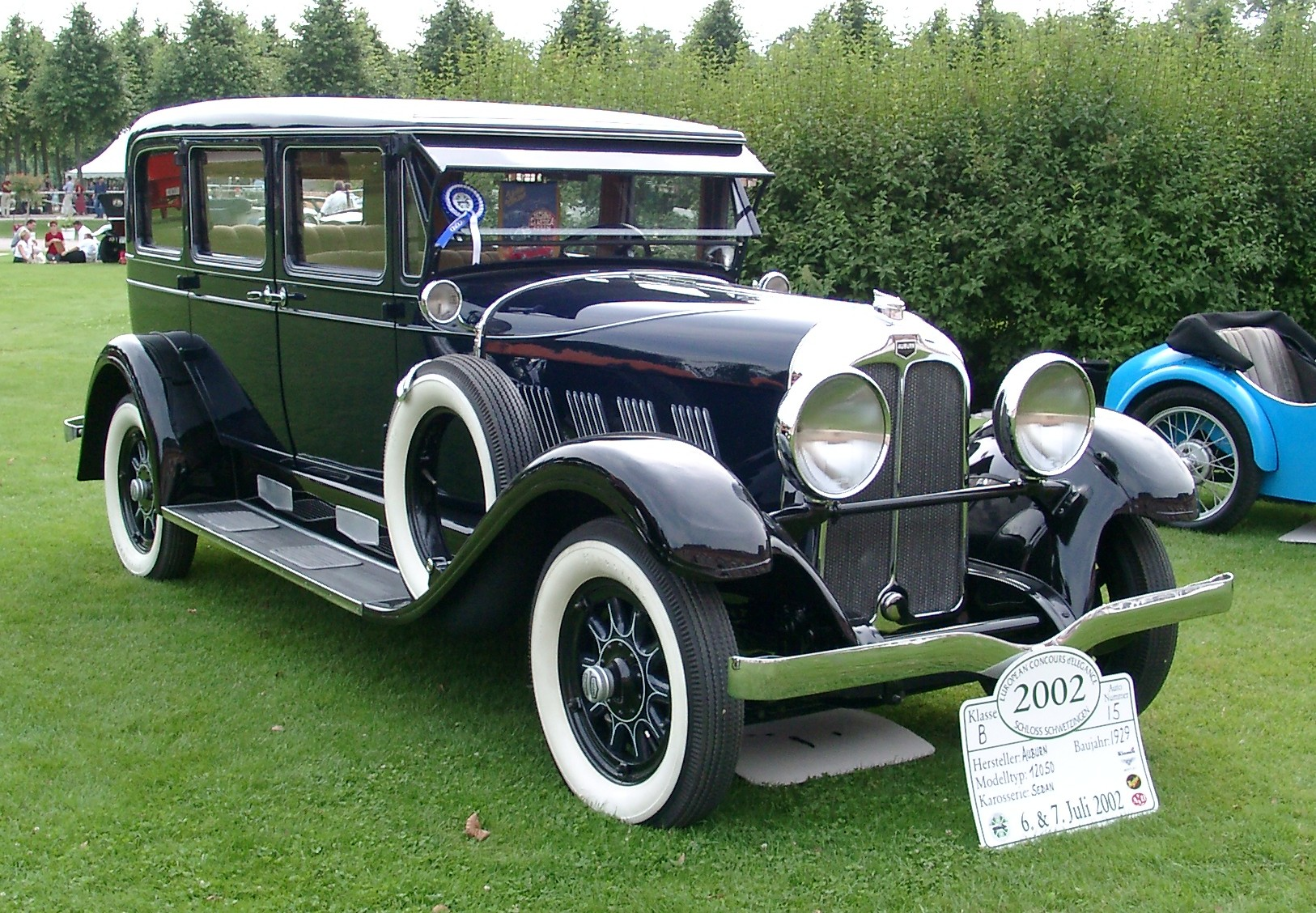 Auburn, Baujahr 1929. Fotografiert anläßlich des European Concours d'Elegance 2002 in Schwetzingen.